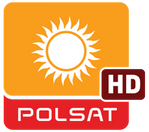 Polski komercyjny kanał telewizyjny, który jako pierwszy w kraju otrzymał koncesję na nadawanie ogólnopolskie. Rozpoczął nadawanie 5 grudnia 1992 o 16:30. Główny kanał Telewizji Polsat.